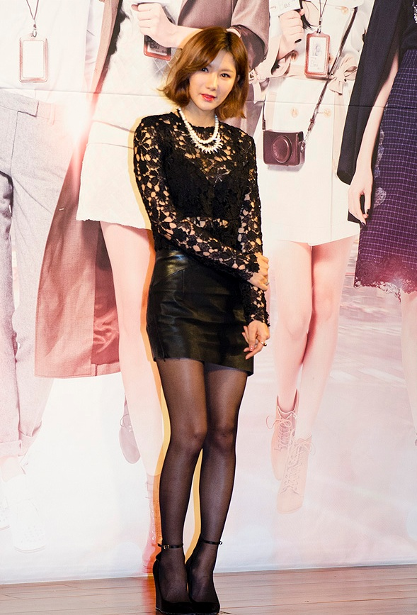 KBS W '애프터스쿨의 뷰티바이블' 제작발표회